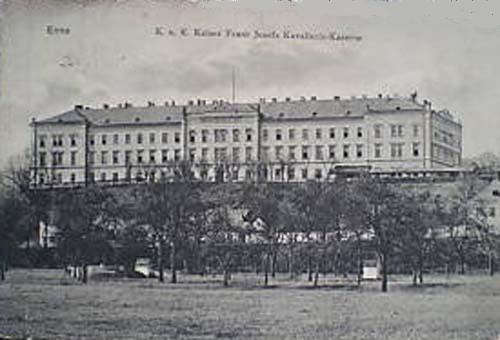 Kavallerie-Kaserne in Enns